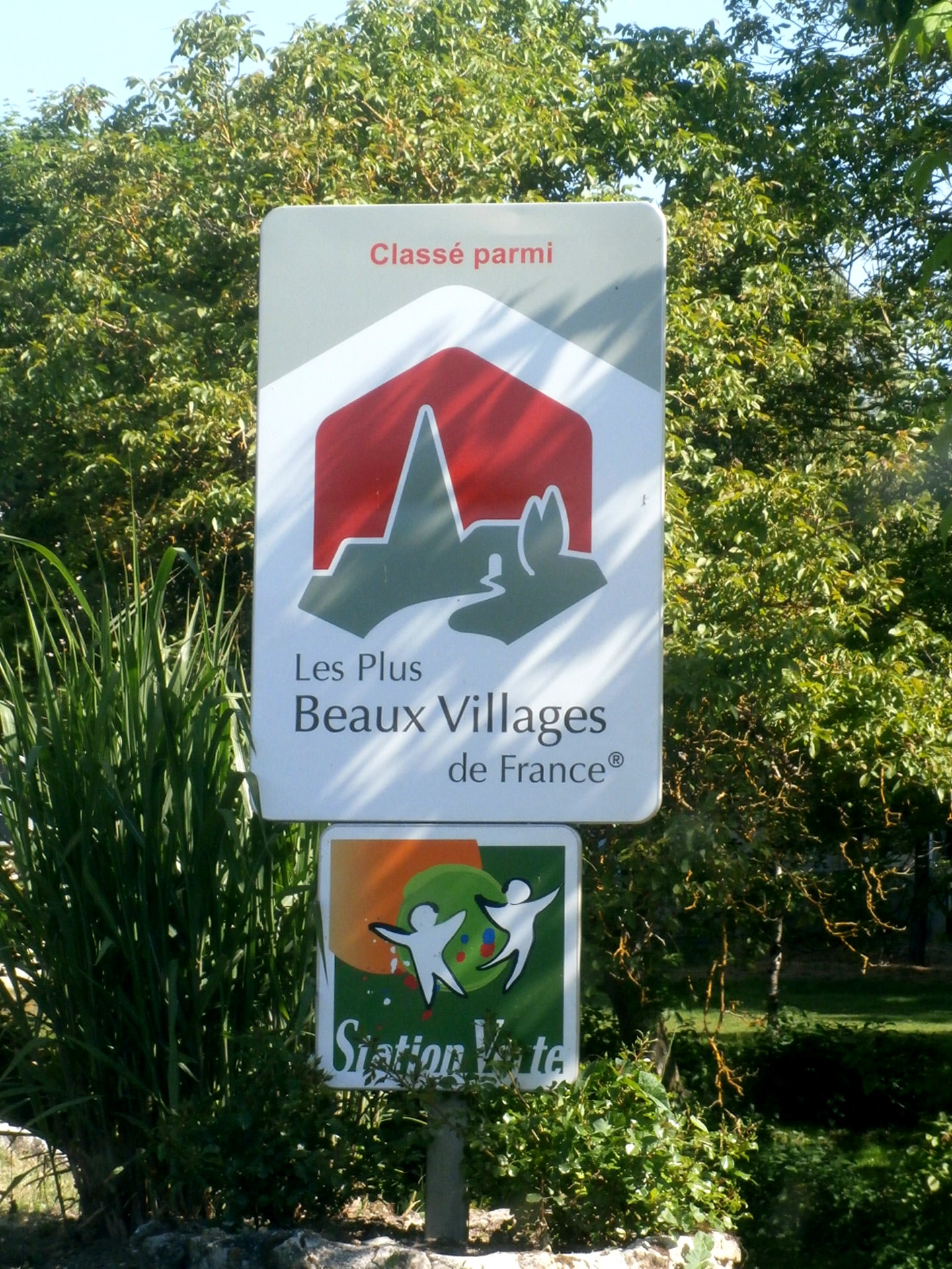 Panneau "Beau village de France"